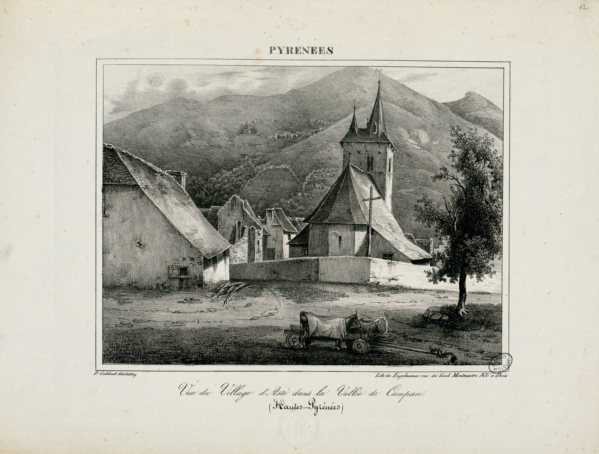 Fait partie d'une série de 42 pl. de Gélibert sur les Pyrénées. Pl. 1 à 11 lith. par Légé (Bordeaux). Pl. 11 à 42 lith. par Engelmann (Paris). Ancely, René (1876 - 1966). Possesseur